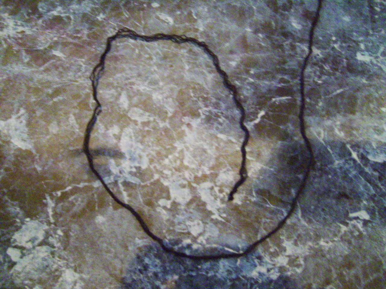 Rekwizyt, używany przez iluzjonistów do sprawiania iluzji lewitacji bądź animacji małych i lekkich przedmiotów.